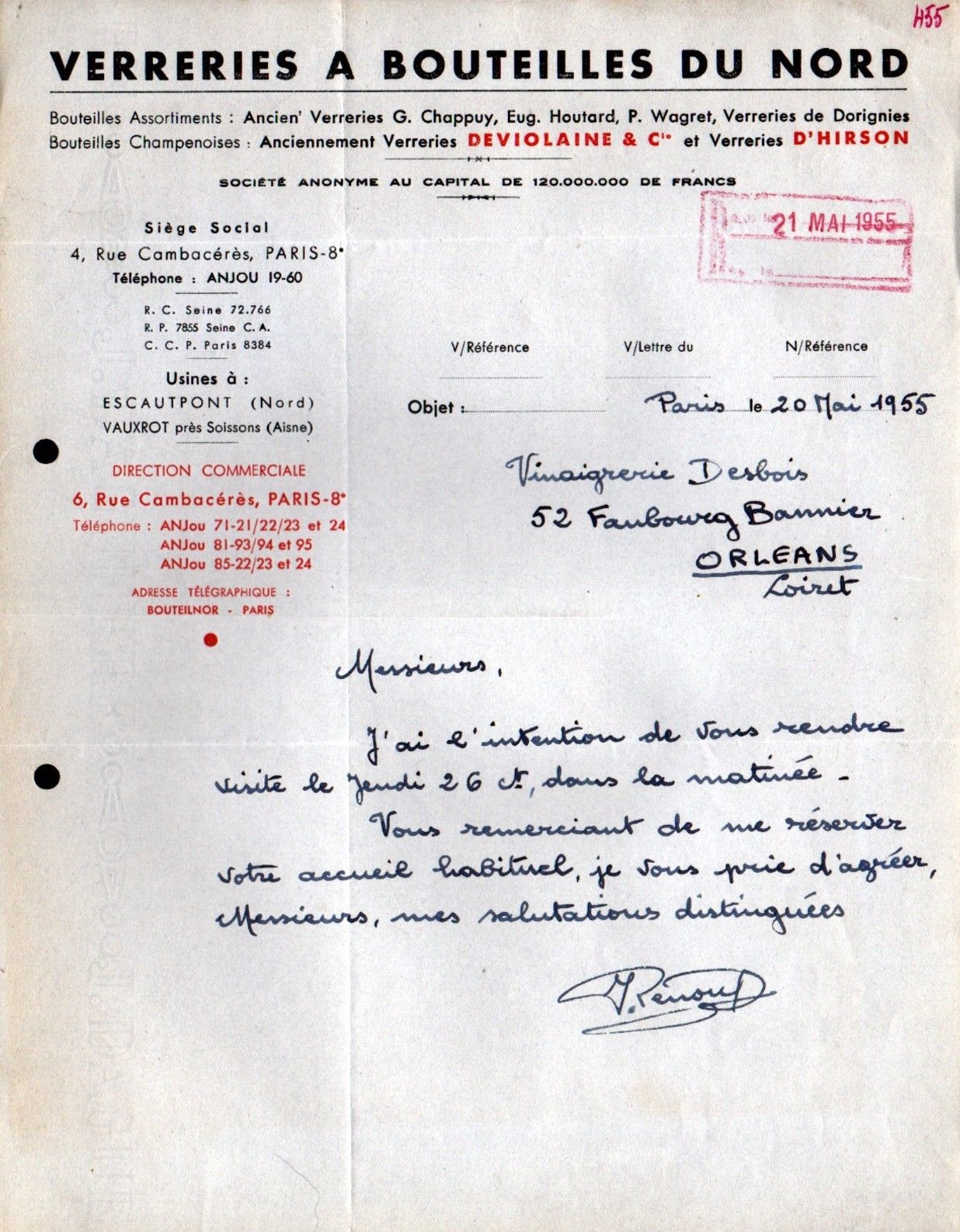 papier en tête